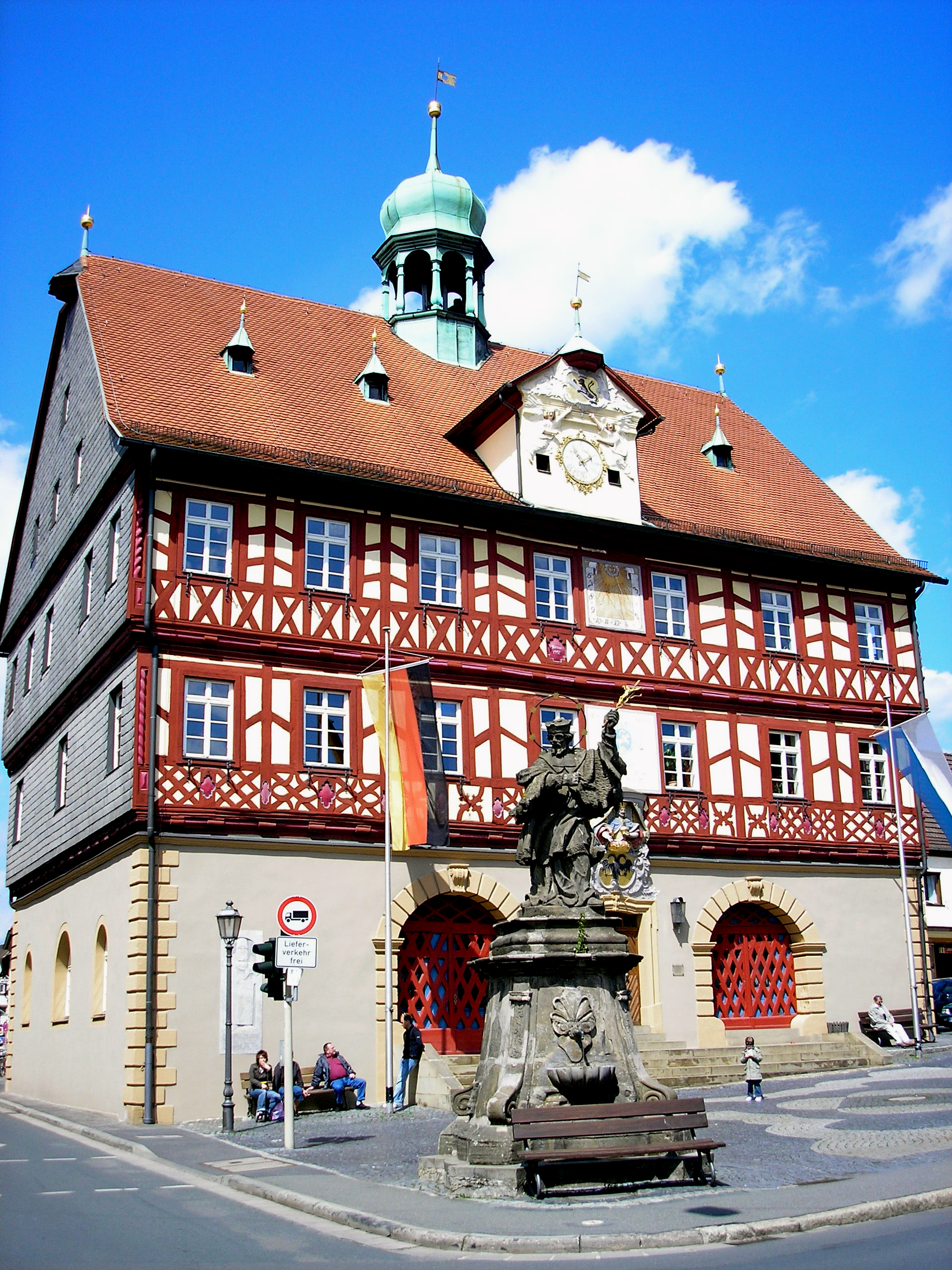 Rathaus der Stadt Bad Staffelstein in Oberfranken (Bayern, Deutschland).